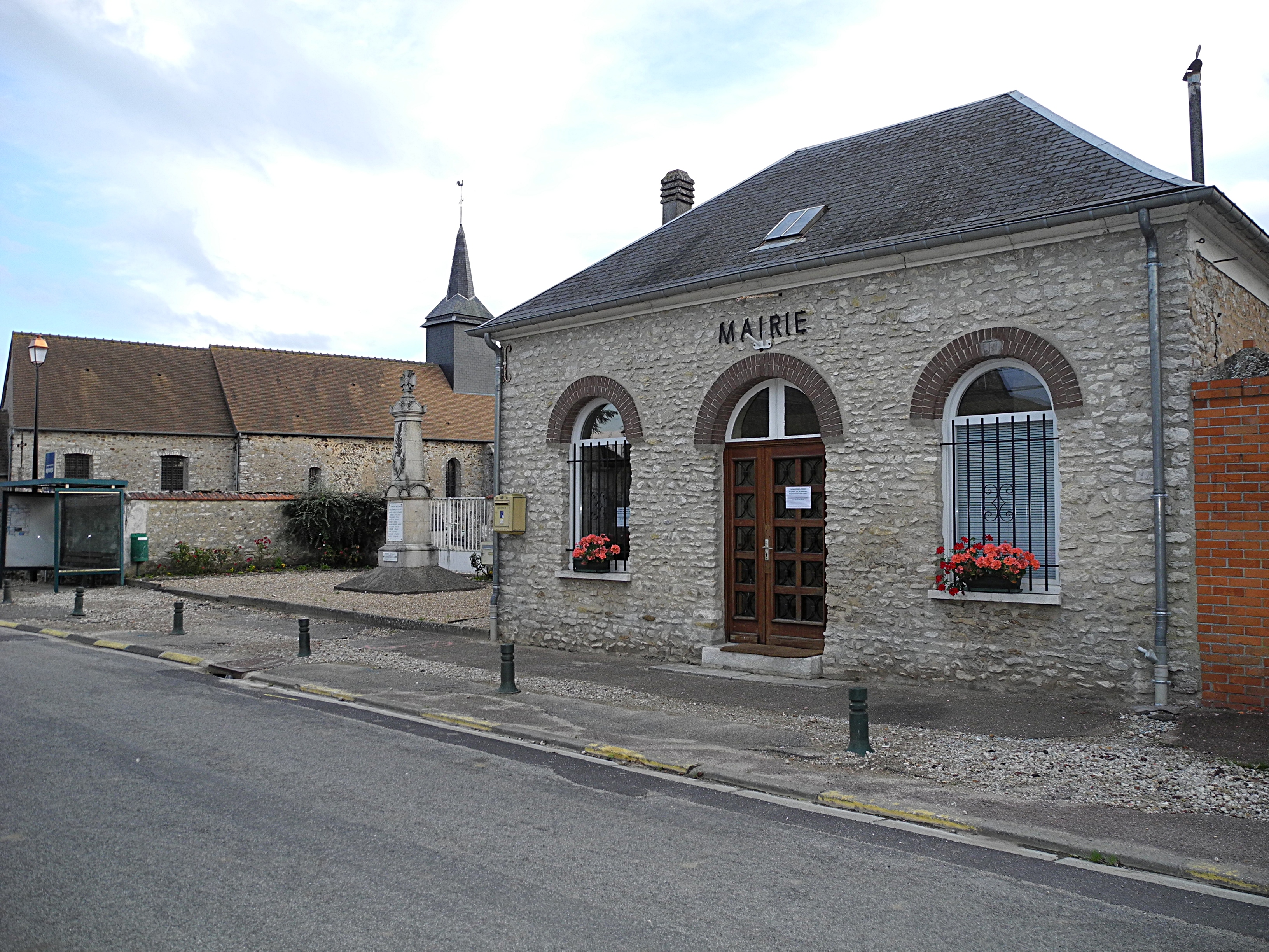 La mairie et l'église Saint-Julien de Chaignes (Eure)